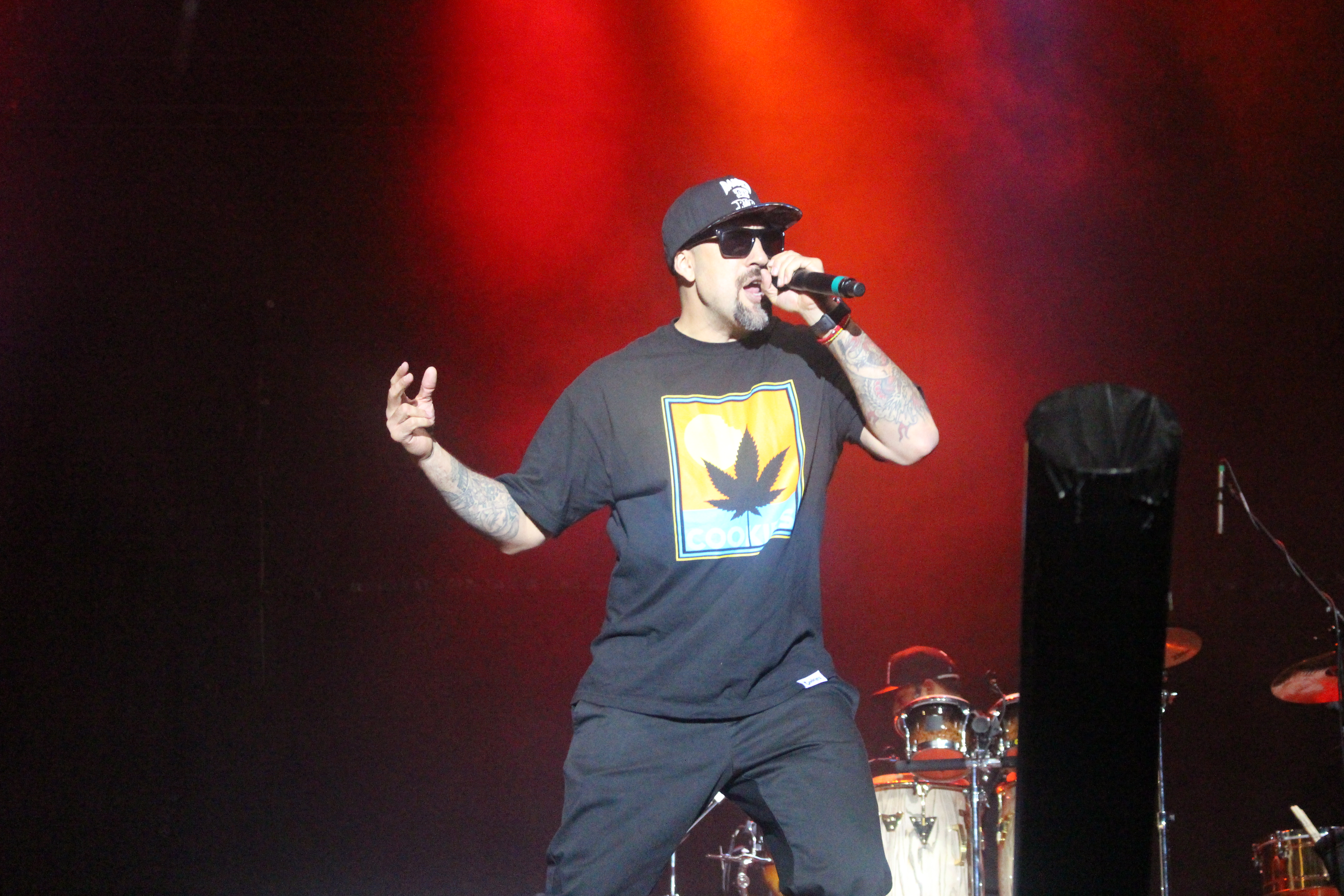 Festivalsommer This photo was created with the support of donations to Wikimedia Deutschland in the context of the CPB project "Festival Summer".